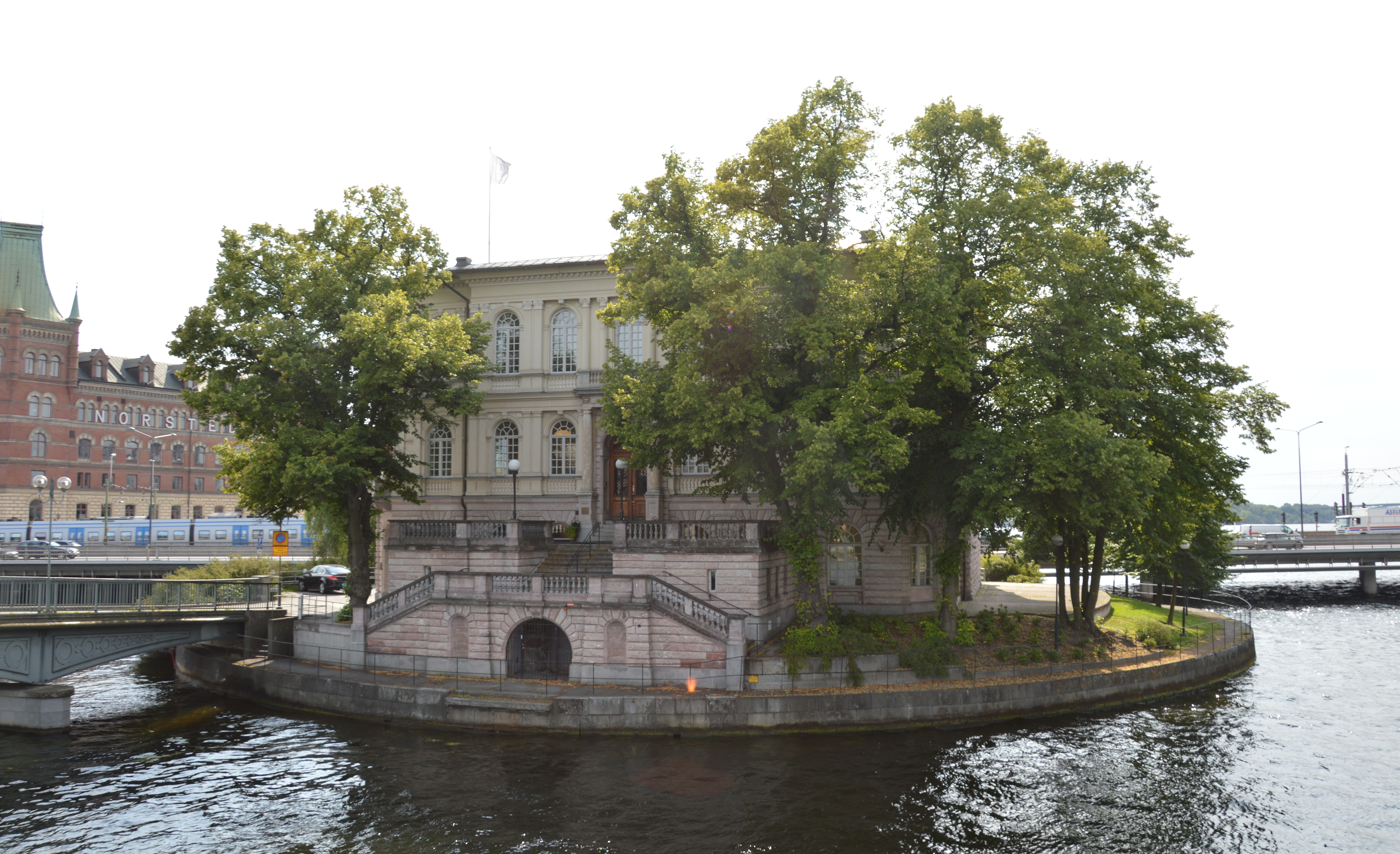 Strömsborg Stockholm